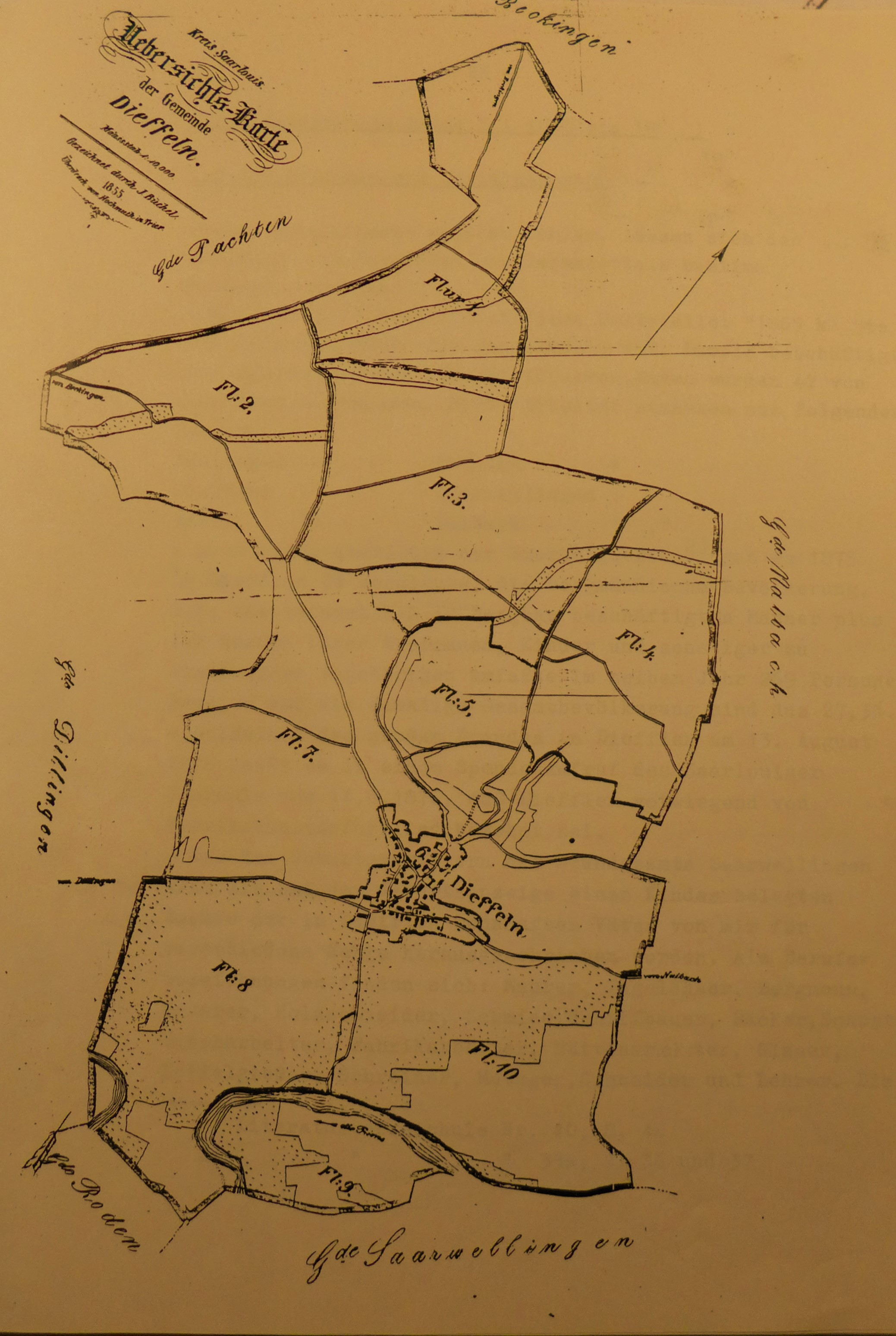 Diefflen, Übersichtskarte von 1855, gezeichnet von J. Büchel, Maßstab 1:1000, Katasteramt Saarlouis